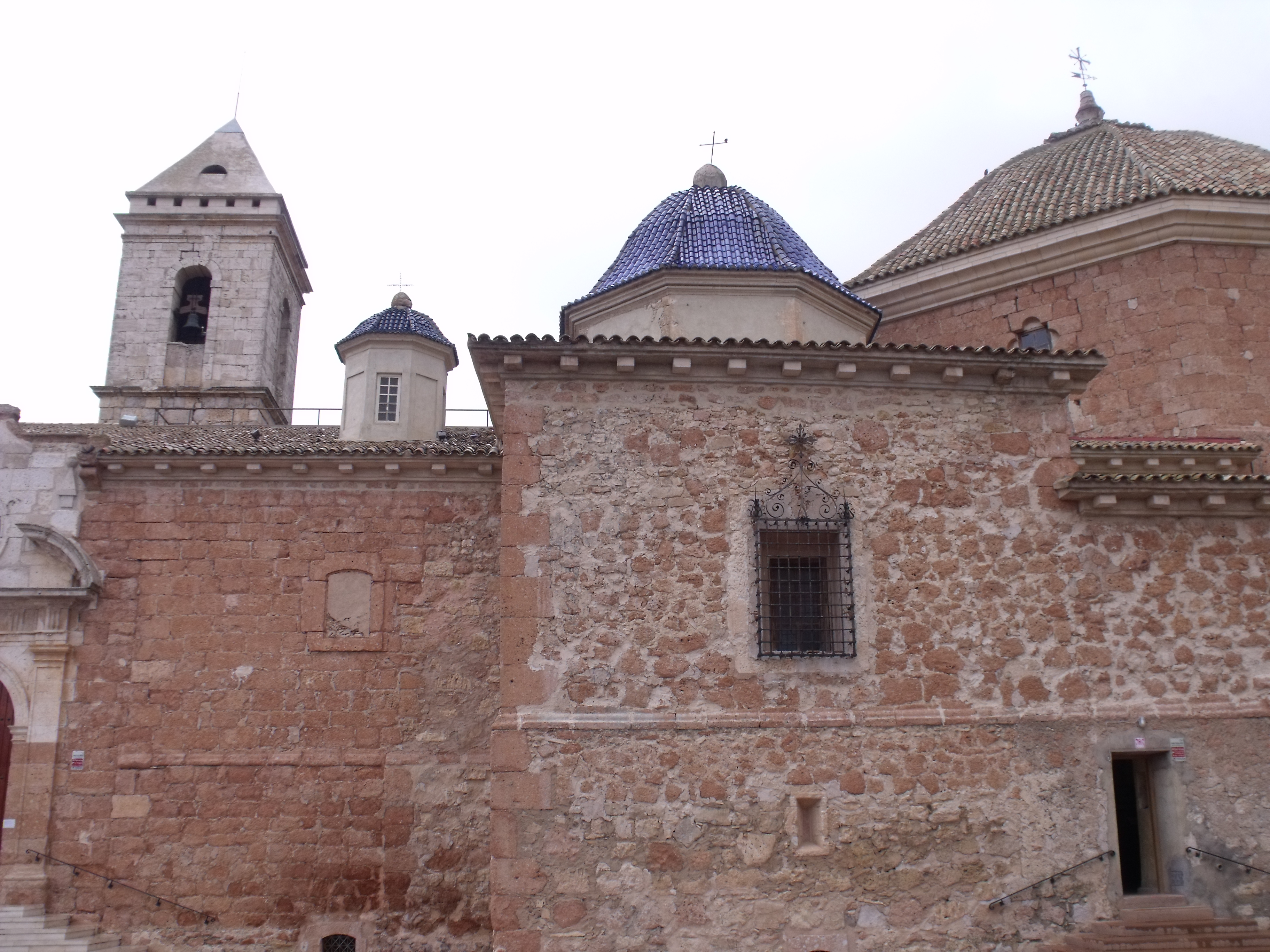 Vista de conjunto